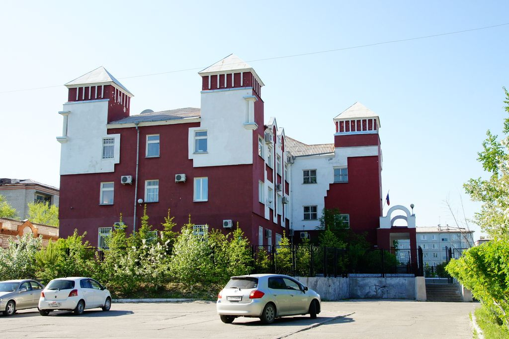 Налоговая инспекция в г. Свободном